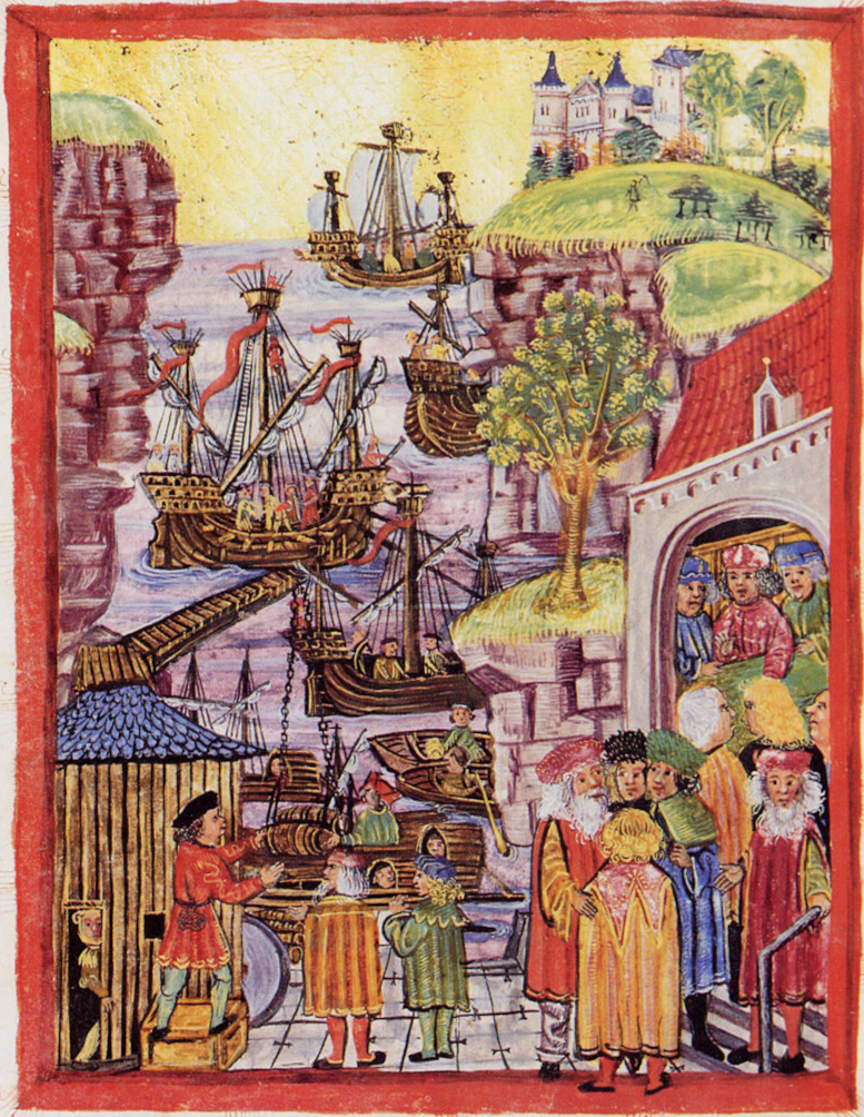 Ausschnitt aus dem Hamburger Stadtrecht von 1497, Aspekt Seerecht (Ausschnitt)